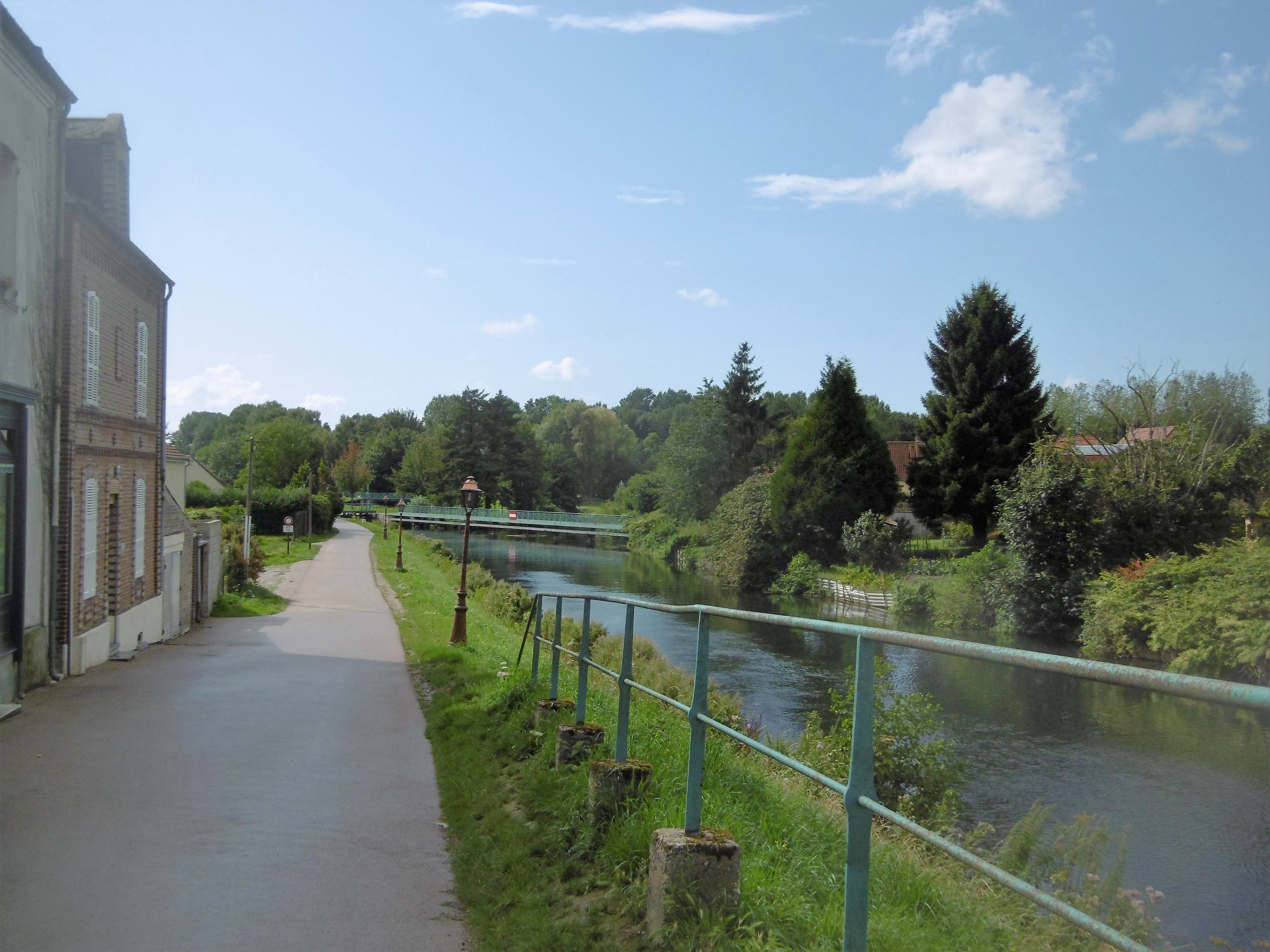 Véloroute à Pont-Rémy vue près du pont vers l'aval